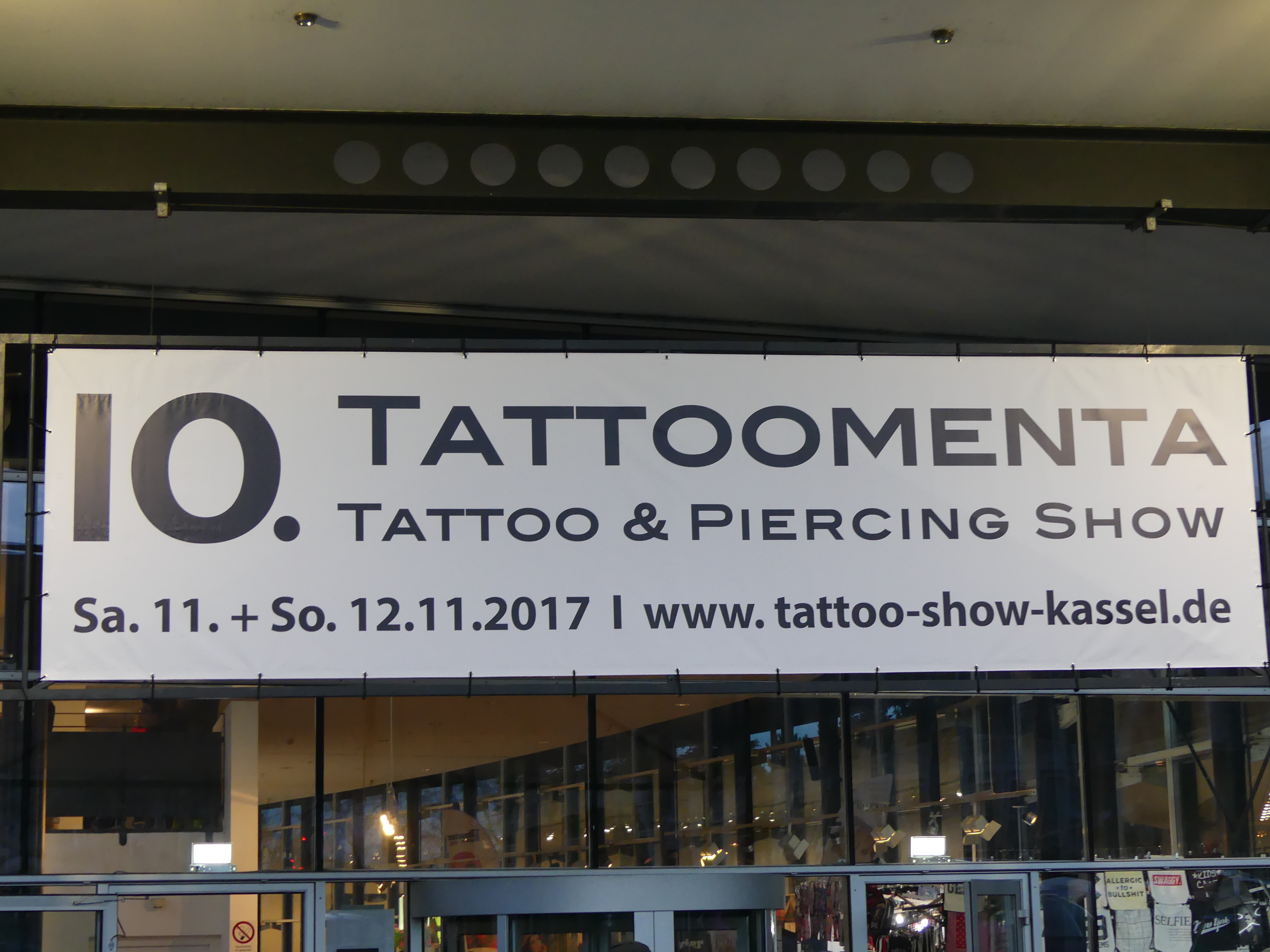 Tattomenta Kassel 2017 Eingang zur Documentahalle